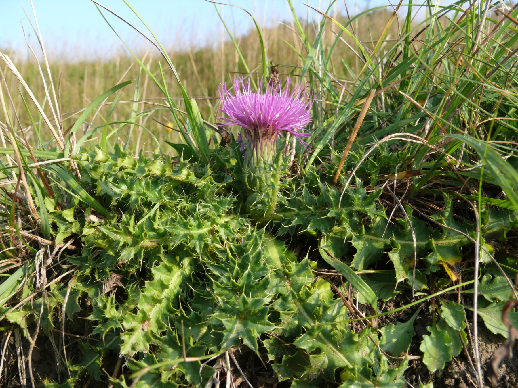 Cirsium acaule, Schwäbisch-Fränkische Waldberge, Germany